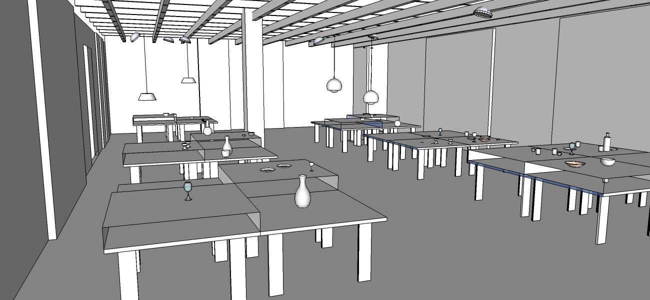 Vista prospettica del padiglione finlandese allestito da Timo Sarpaneva e presentato all'interno delle Sezioni Nazionali alla XI edizione della Triennale di Milano